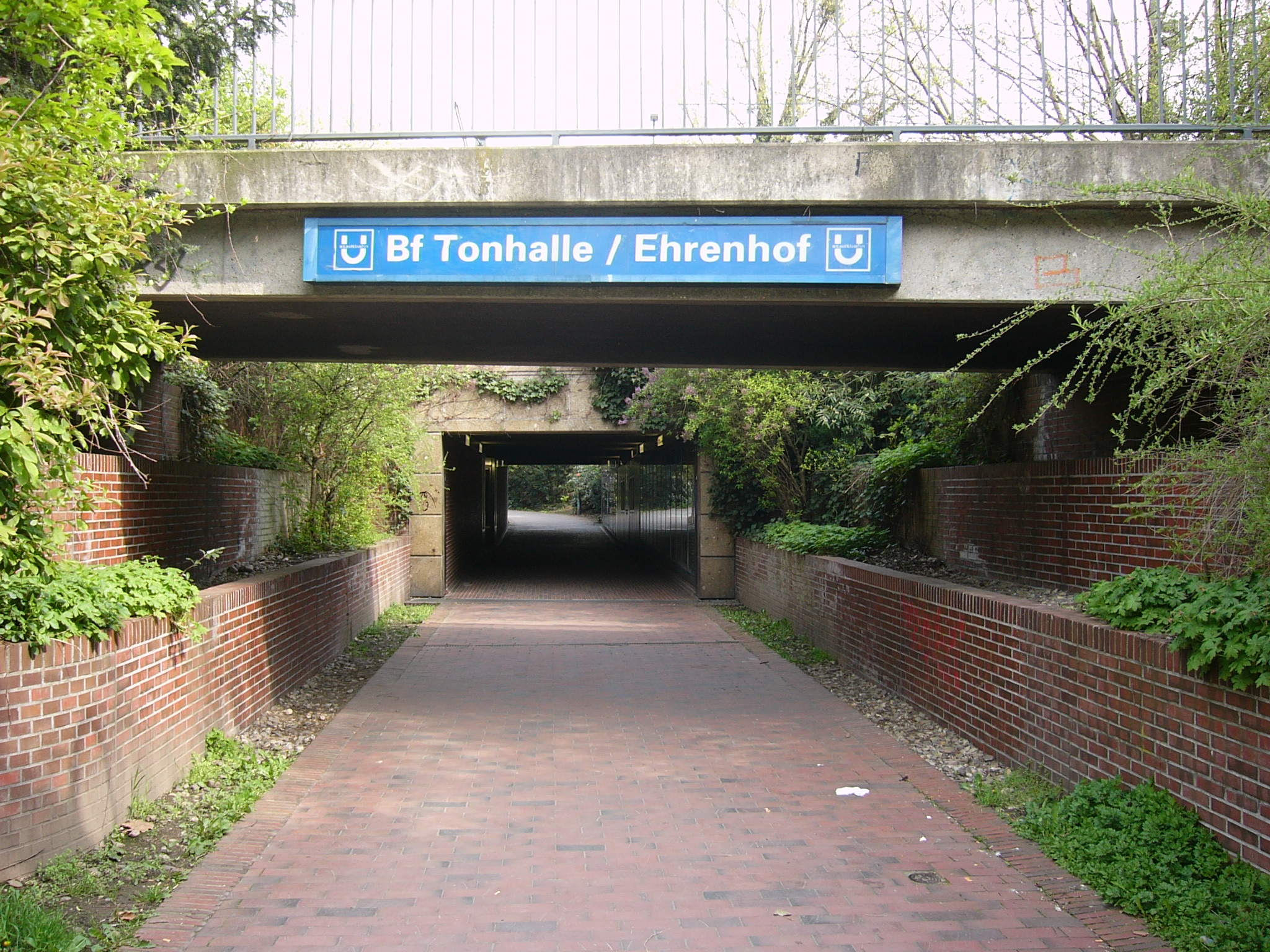 Durchgang am U-Bahnhof Tonhalle/Ehrenhof (Südseite)